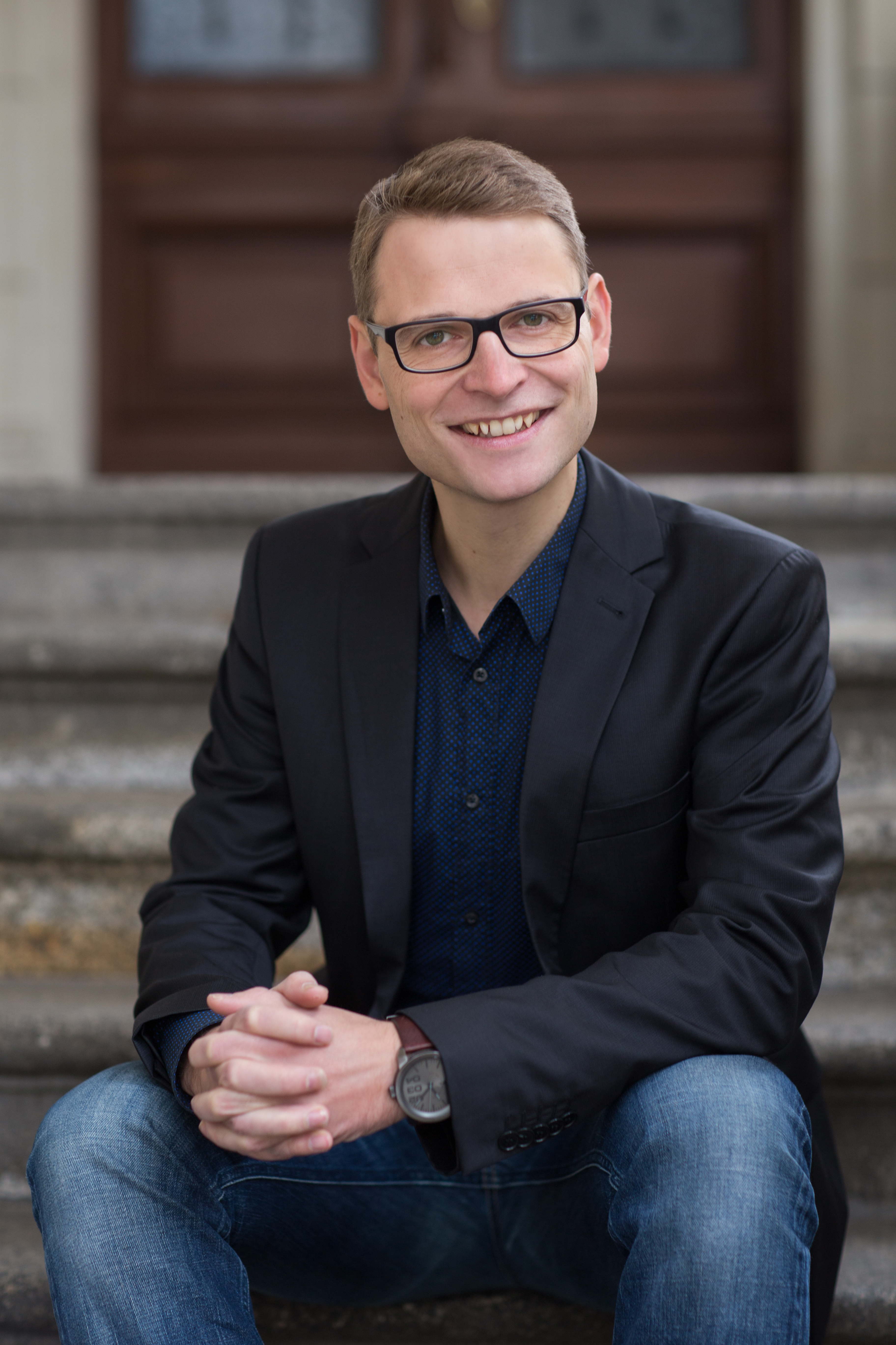 Bertram Triebel